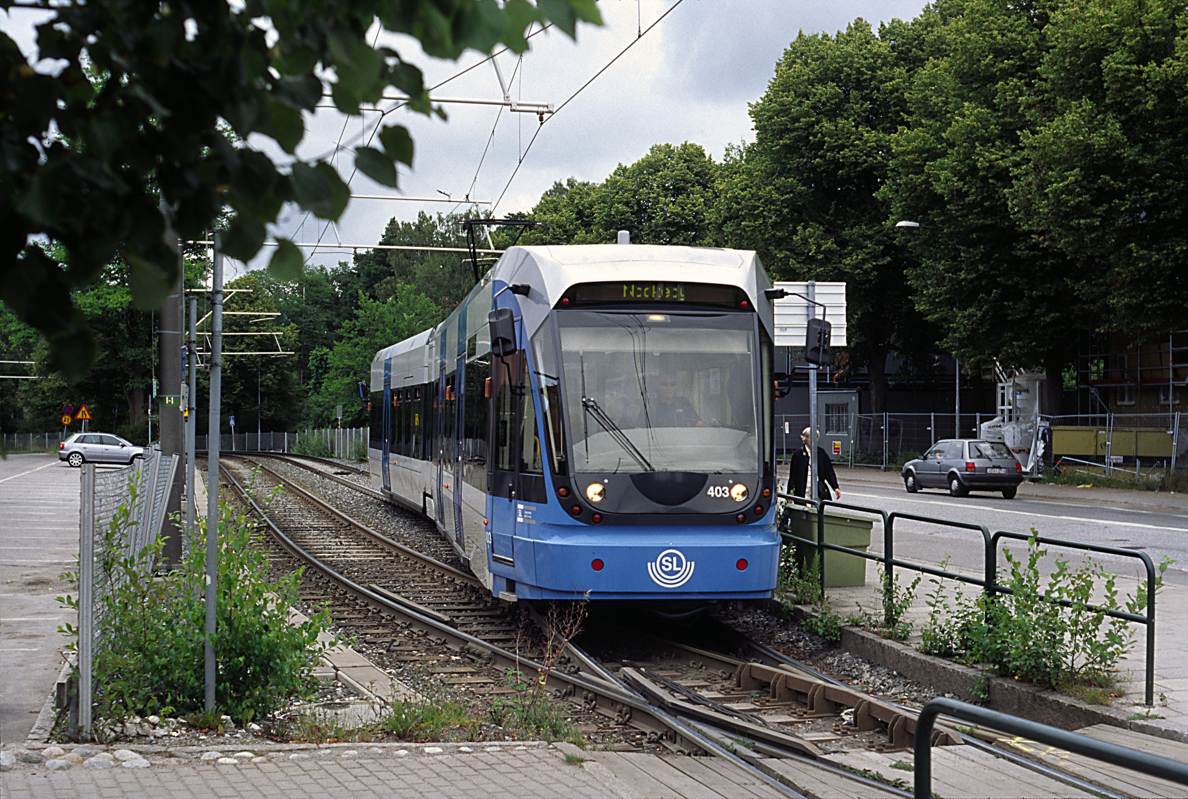 Nockebybanan, Zug nach Nockeby am Hp Alléparken beim Wechsel in den Rechtsfahrbetrieb.